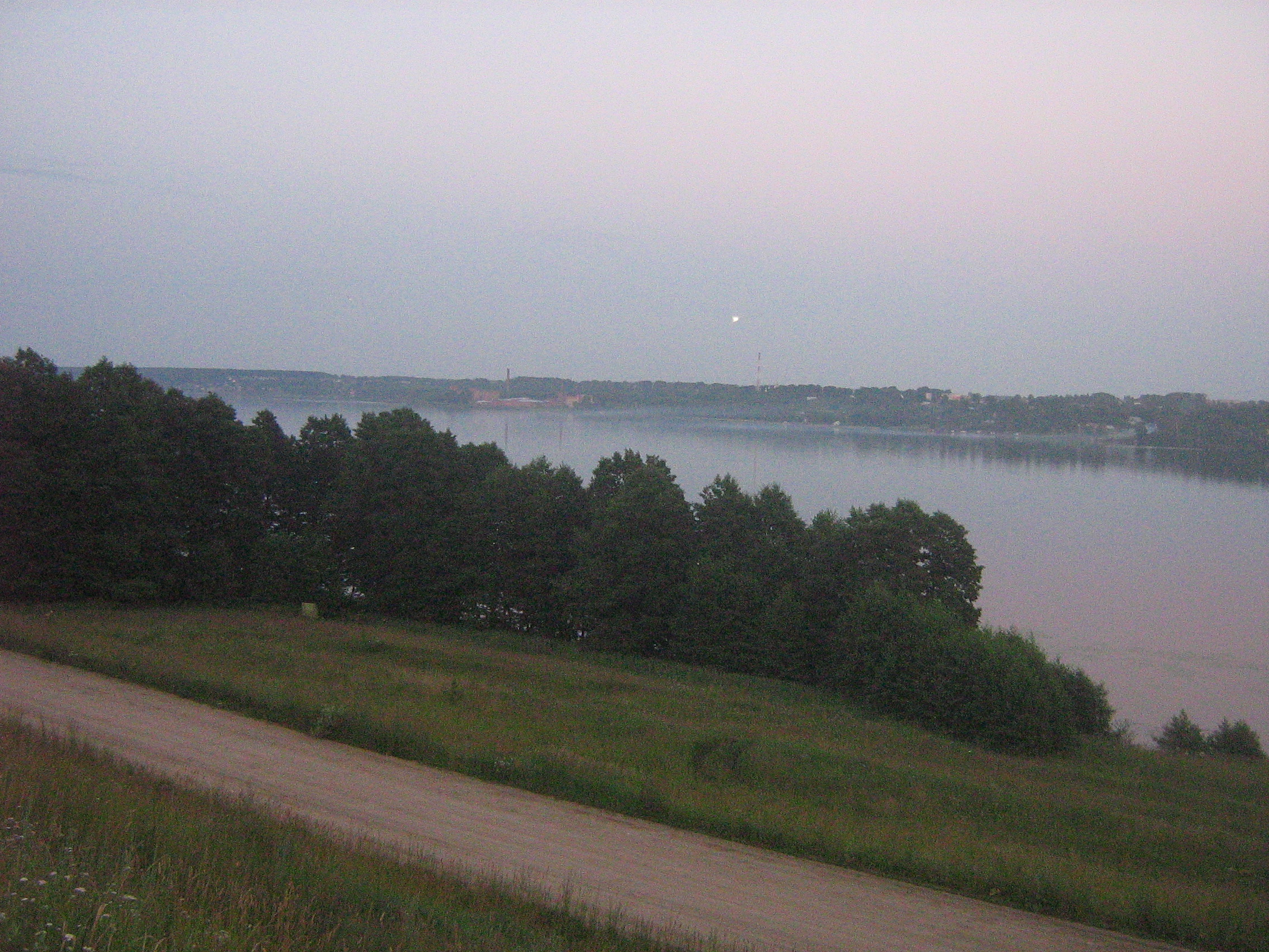 вид на Наволоки